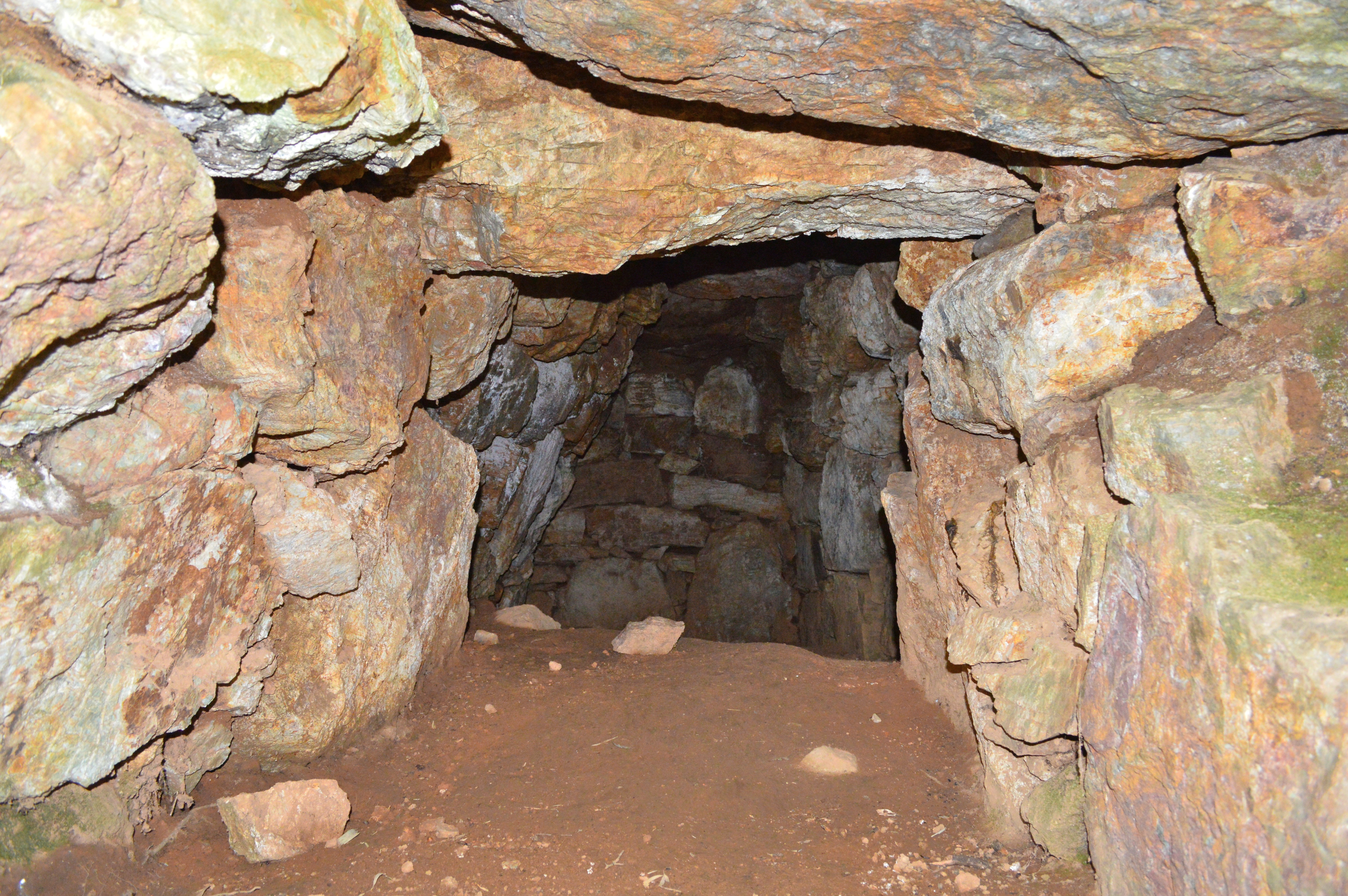 明見彦山1号墳 石室内部